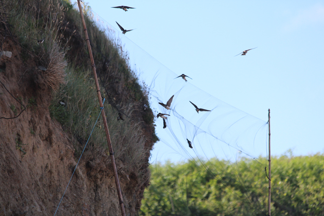 Capture d'Hirondelle dans le cadre de la méthode capture-marquage-recapture